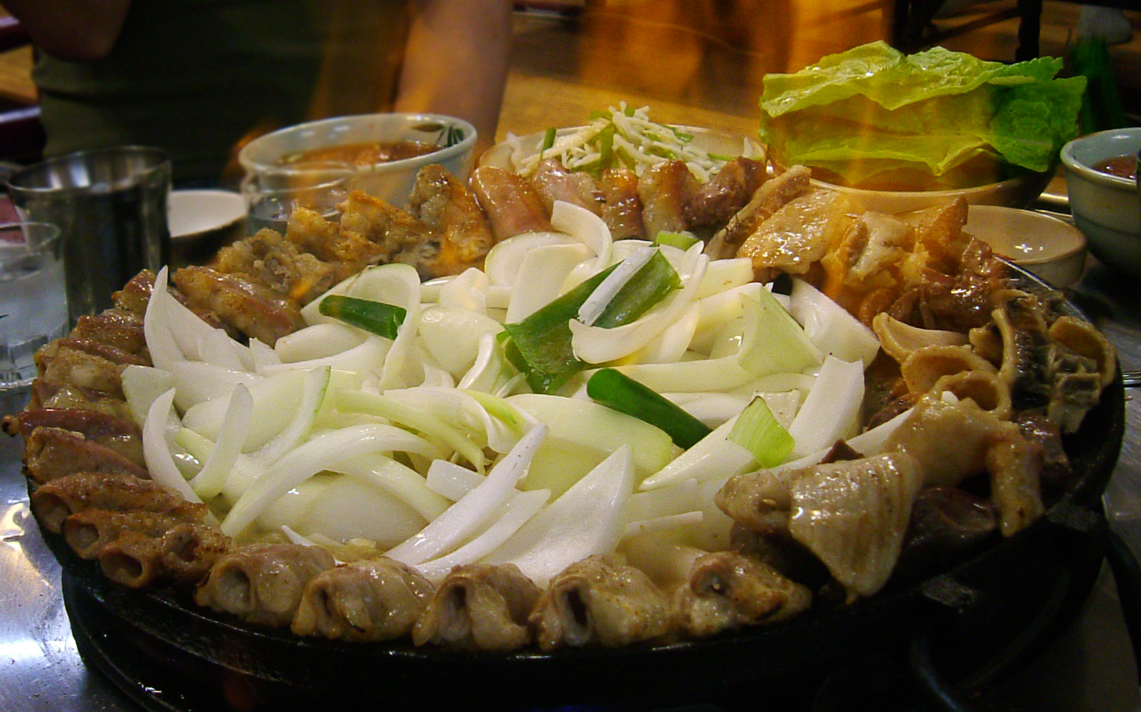 Gobchang bokkem